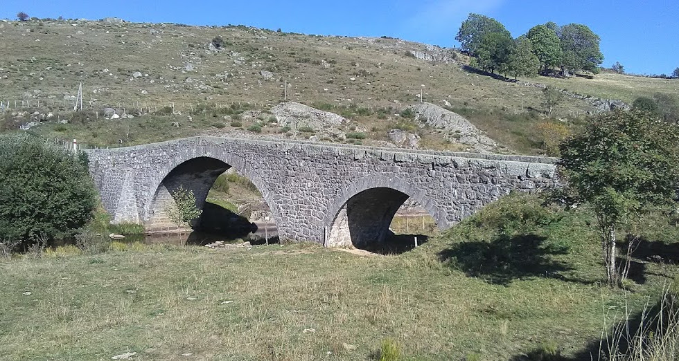 Pont de Gournier, sur le Bès, commune de Recoules d'Aubrac (Lozère).